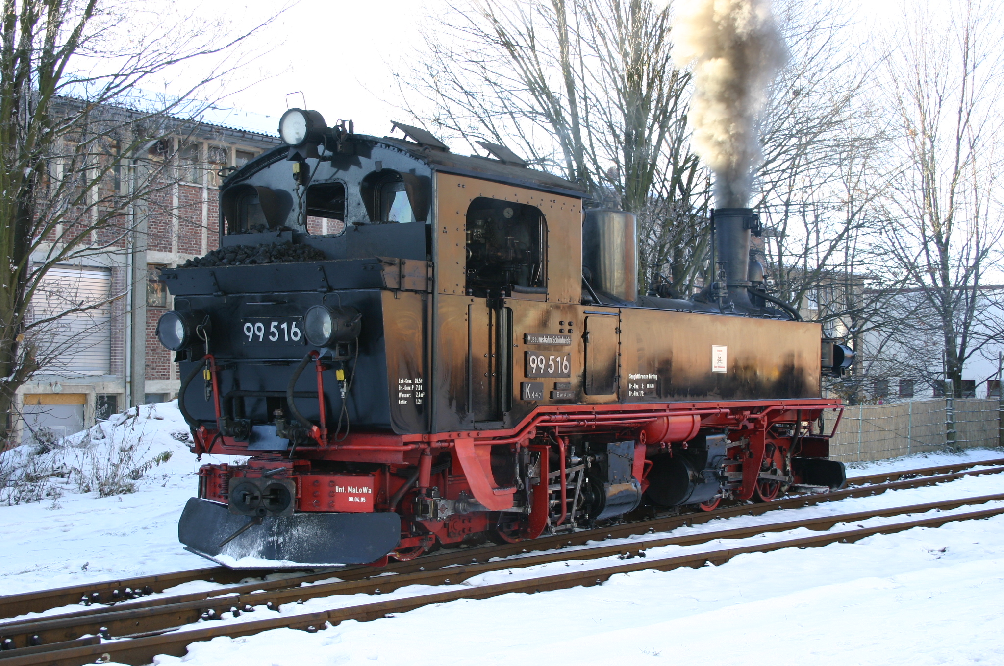 Schmalspurdampflok 99 516 in Stützengrün 10.12.05